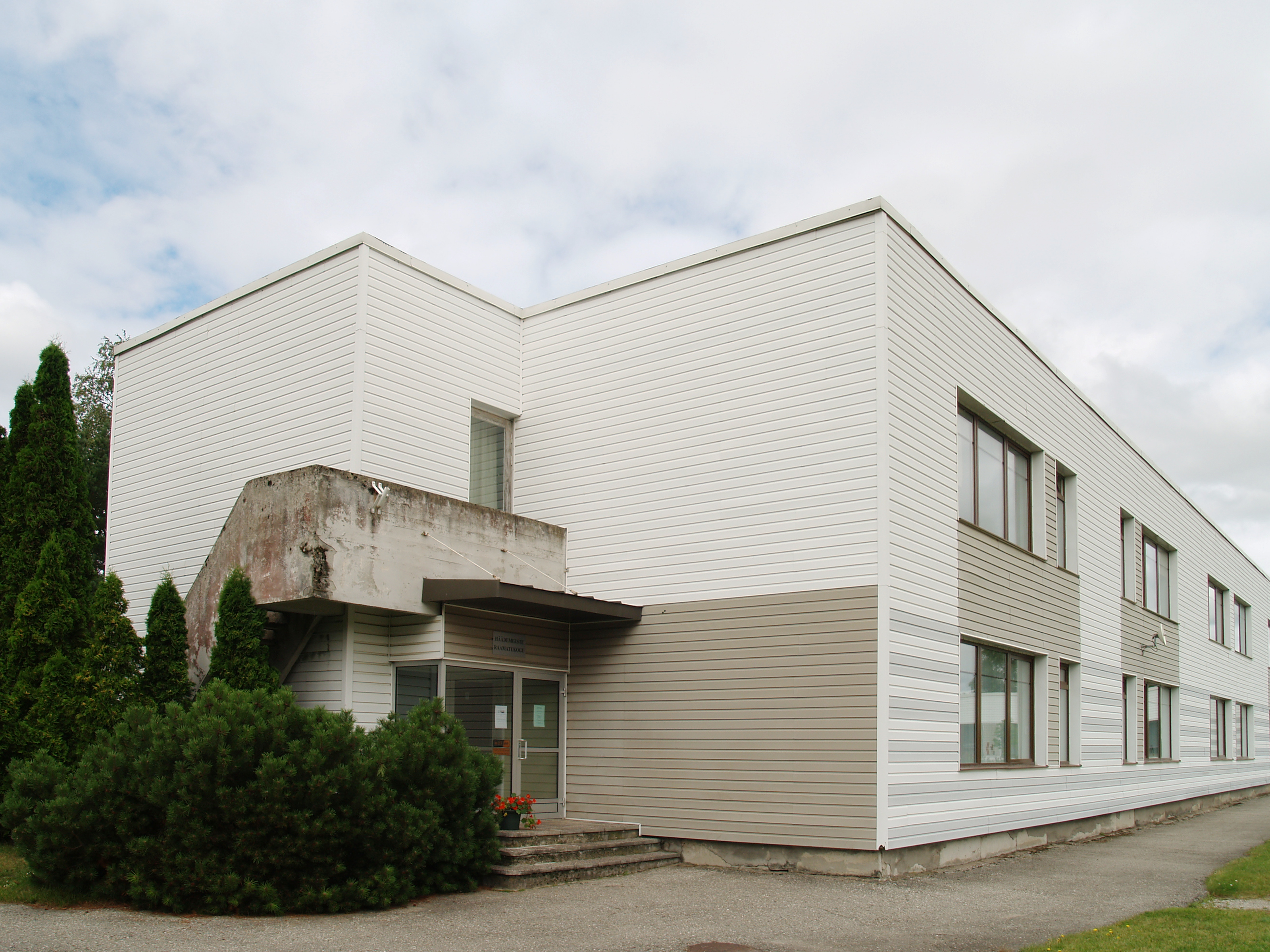 Häädemeeste raamatukogu